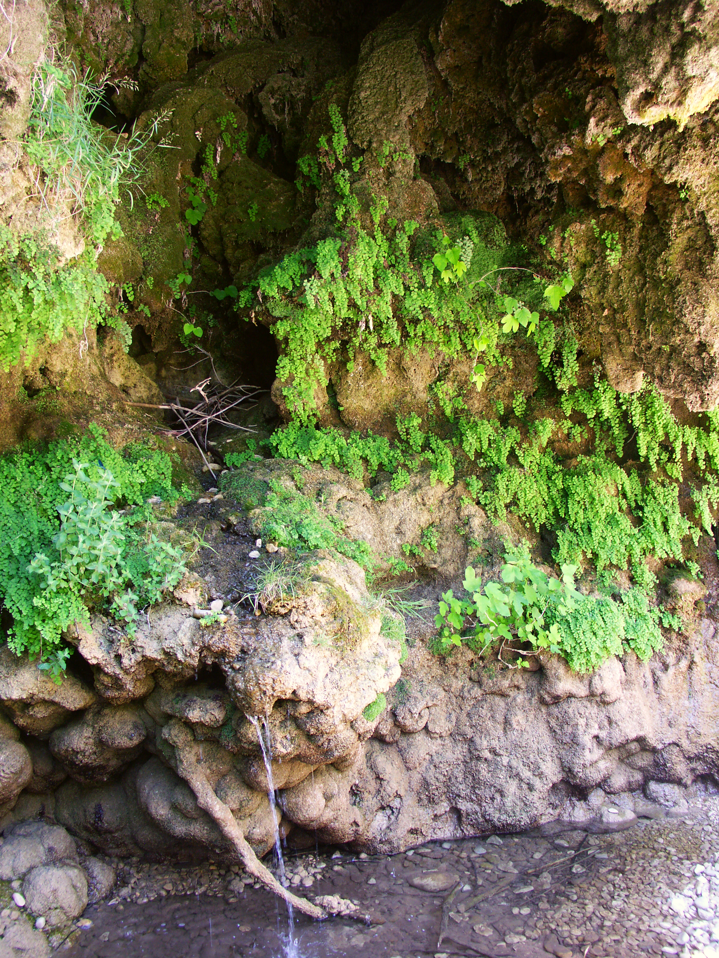 Localisation : Stolac, Bosnie et Herzégovine Zone continentale méditerranéenne, Alpes Dinariques.